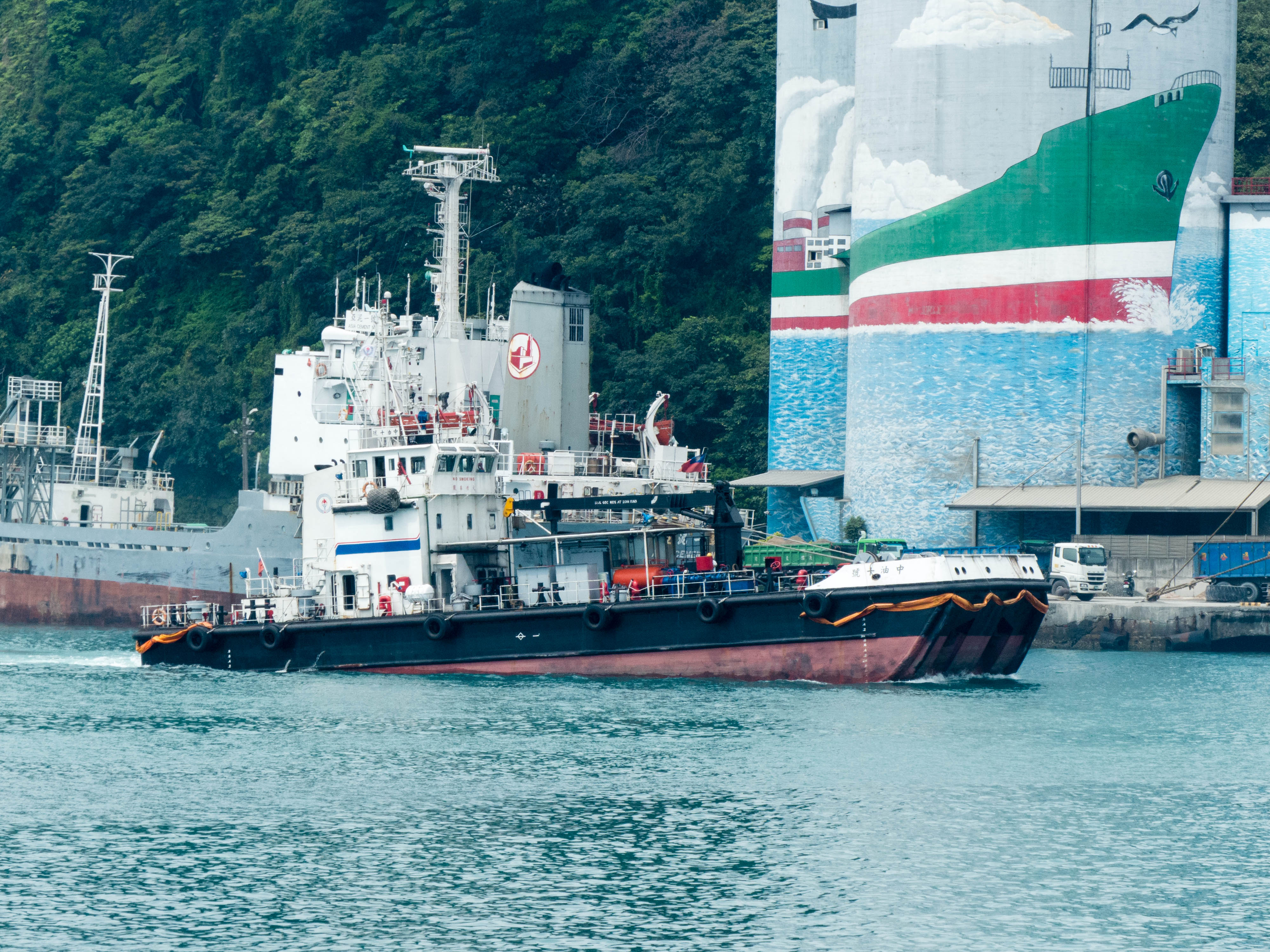 中文（台灣）: 基隆港西12B碼頭前空船狀態的中油油駁船中油十號，後方是水泥船亞泥一號船尾。